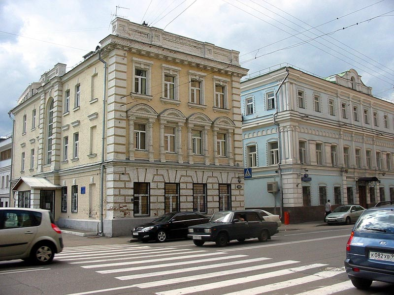 46, 48, Sadovnicheskaya Street, Moscow